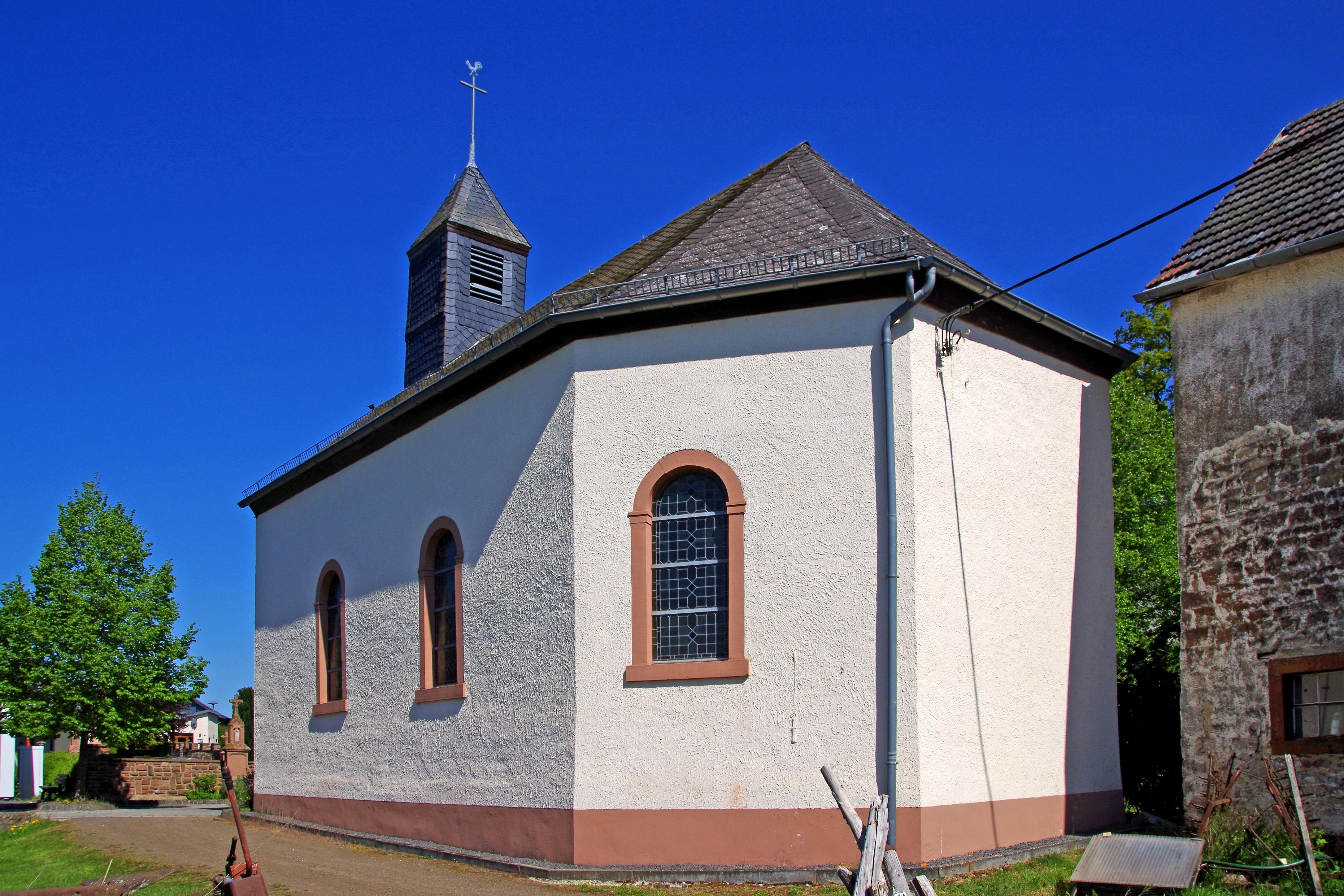 St. Eligius (Basberg), Südostansicht